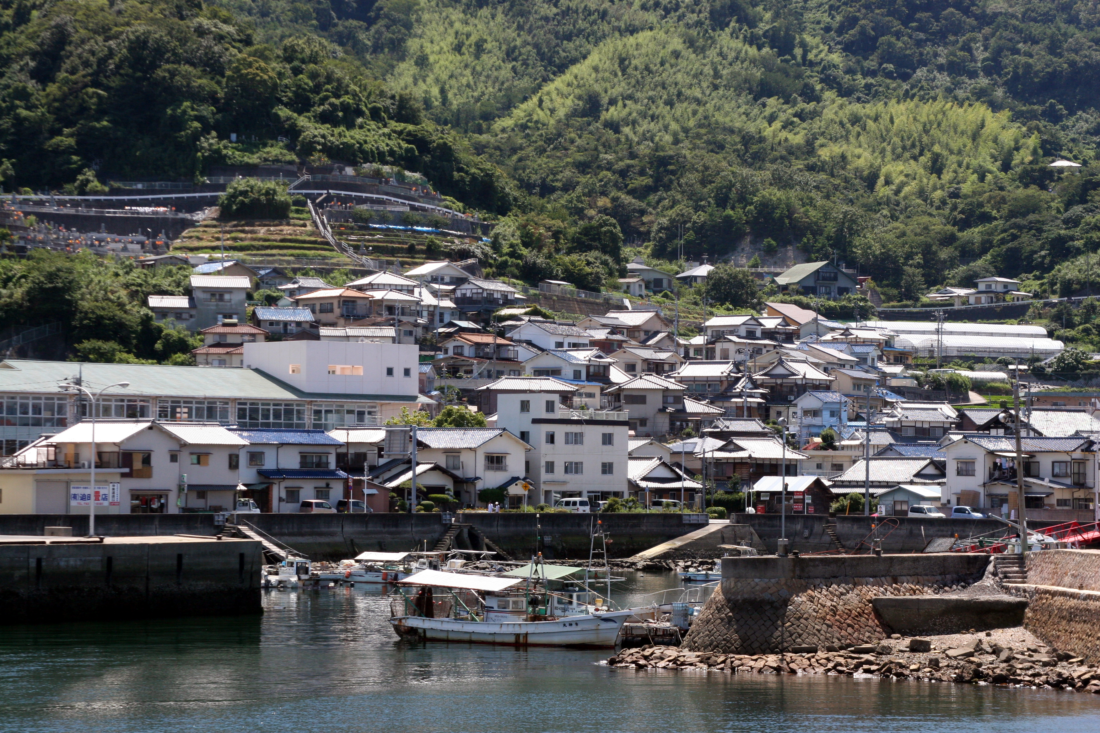 Okimi, Japan